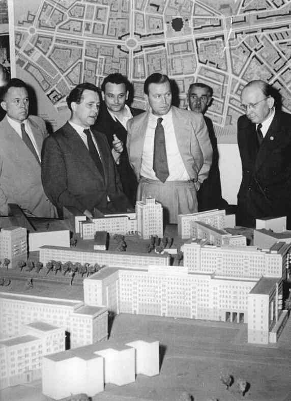 Zentralbild Heilig 6.8.1954 Aussprache zwischen Dr. John und Prof. Dr. Correns. Der ehemalige Präsident des Bonner Verfassungsschutzamtes, Dr. Otto John, suchte am 5.8.1954 den Präsidenten des Nationalrates, Prof. Dr. Correns, auf. Dr. Correns informierte Dr. John auf Wusch ausführlich über die Ziele und Aufgaben der Nationalen Front im Kampf um die friedliche Wiederherstellung der Einheit Deutschlands auf demokratischer Grundlage. In einem längeren offenherzigen Gespräch erklärte Dr. John, dass er seine Kräfte freudig für diese patriotische Aufgabe zur Verfügung stelle. Im Anschluss an die Unterredung besichtigten Dr. John und Prof. Dr. Correns das Hochhaus F-Süd in der Stalinallee. Der Chefarchitekt von Groß-Berlin, Nationalpreisträger Prof. Henselmann, erläuterte die Anlage der Stalinallee und die Wiederaufbaupläne des demokratischen Magistrats für die deutsche Hauptstadt. Dr. John besucht in der Stalinallee unter anderem eine Neubauwohnung, das im Bau befindliche Kinderkaufhaus und die Deutsche Sporthalle. UBz: In der Bauausstellung Deutsche Sporthalle Berlin, Stalinallee. (1.Reihe v.r.n.l.) Prof. Dr. Correns, Dr. John, Professor Henselmann.